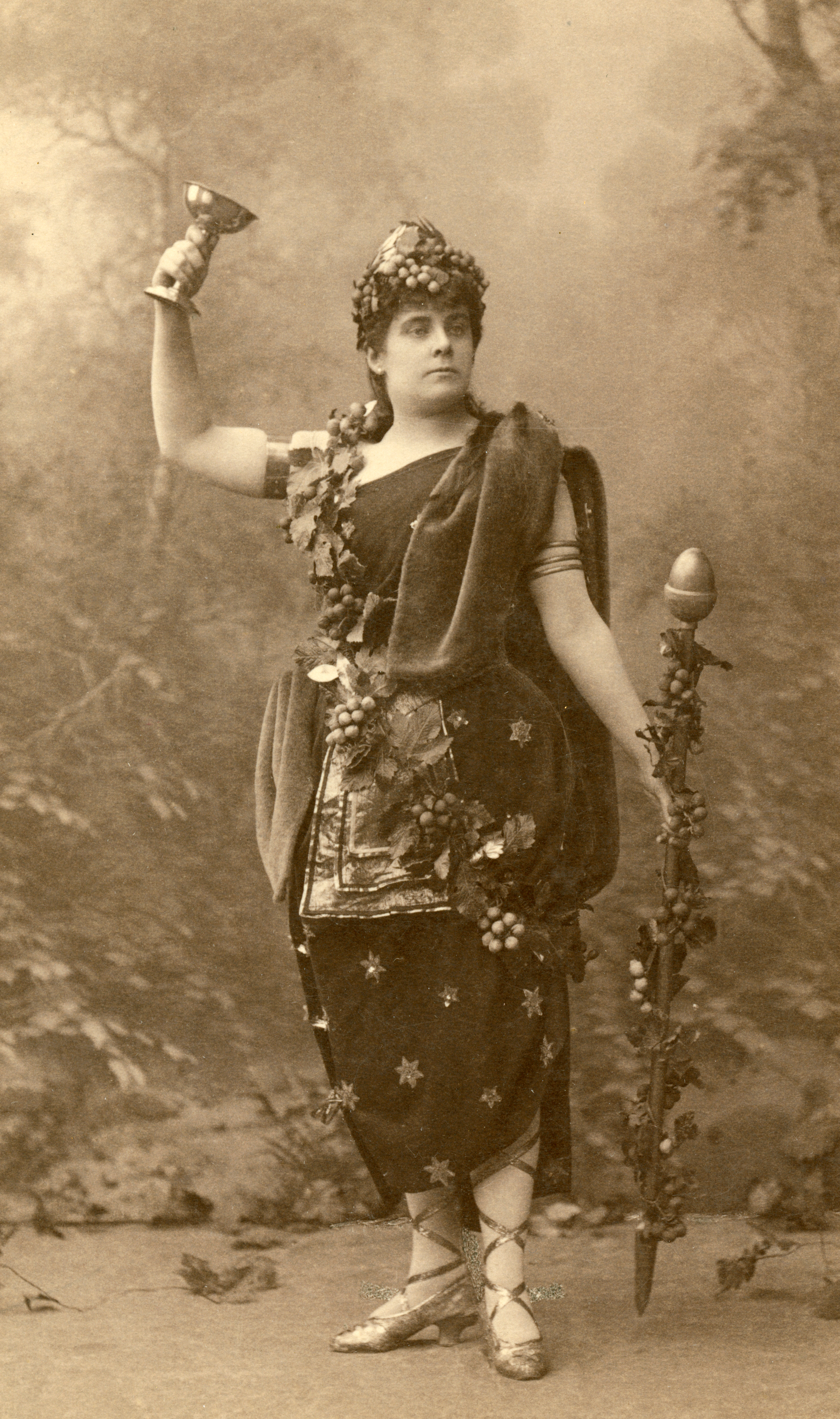 Fahlman, Louise Johanna f. Jensen (1856-1918) som Messalina i Arria och Messalina, Nya teatern 1887